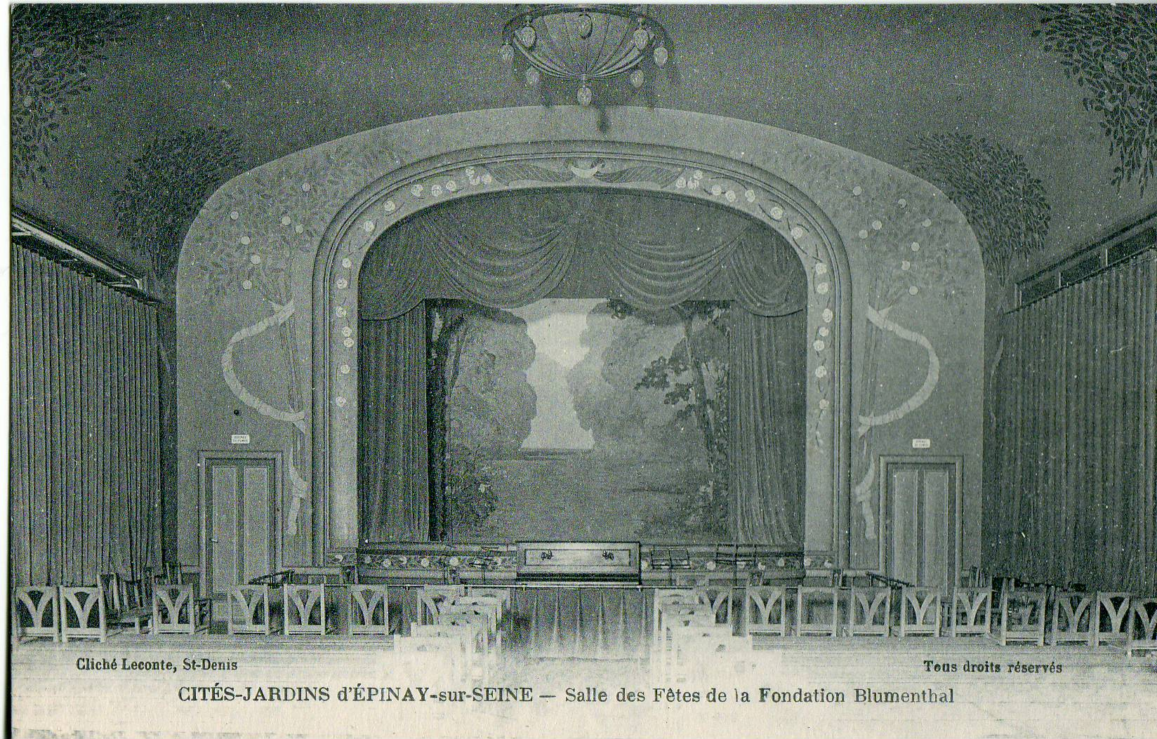 Carte postale ancienne éditée par Leconte à Saint-DenisCités-jardins d'Épinay-sur-Seine - Salle des fêtes de la Fondation Blumenthal